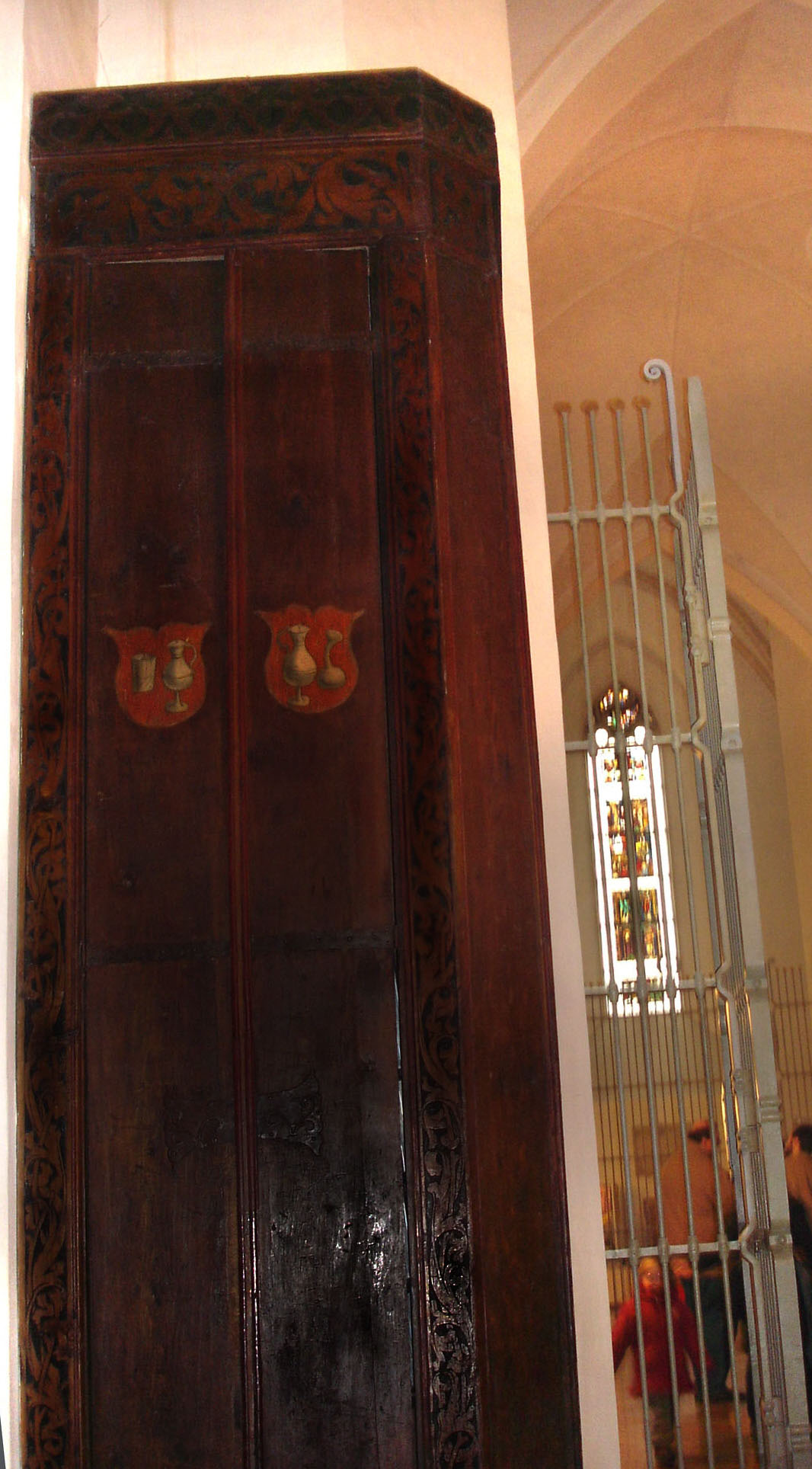 Fahnenschrank Wein+Brandweinausschenkerzunft Frauenkirche